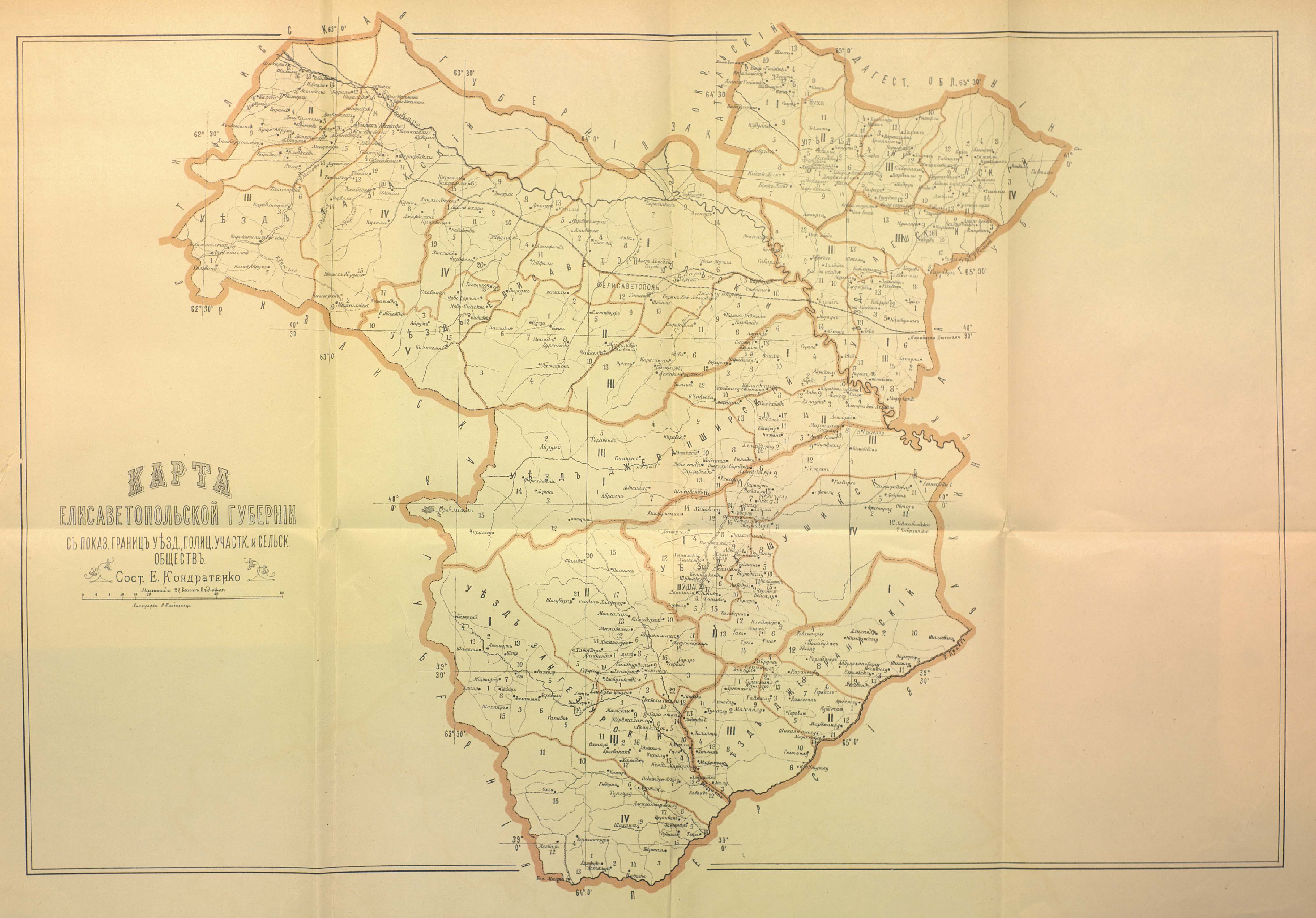 Карта Елизаветпольской губернии с указанием границ уездов, полицейских участков и сельских обществ.